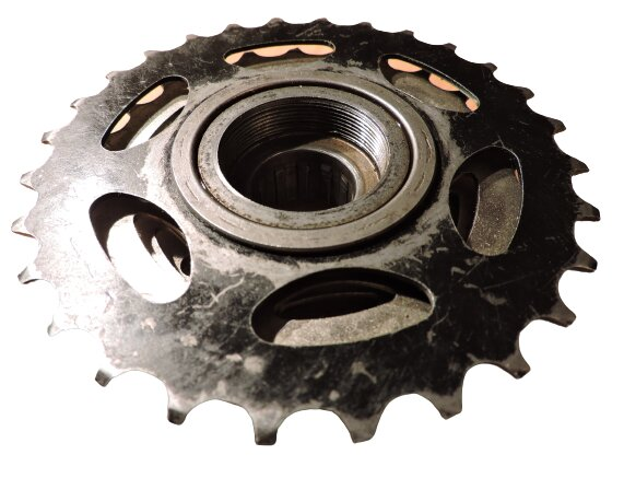 Задняя часть велотрещотки